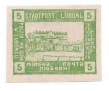 Любомльські_марки_-_5.jpg: марка, номіналом 5